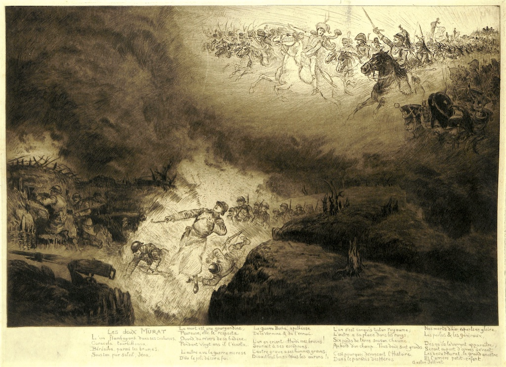 Gravure d'Albert ROBIDA avec un texte de Gaston JOLLIVET célébrant les deux MURAT : Louis Murat mort au combat le 21 août 1916 et le prince Joachim Murat maréchal de l'Empire